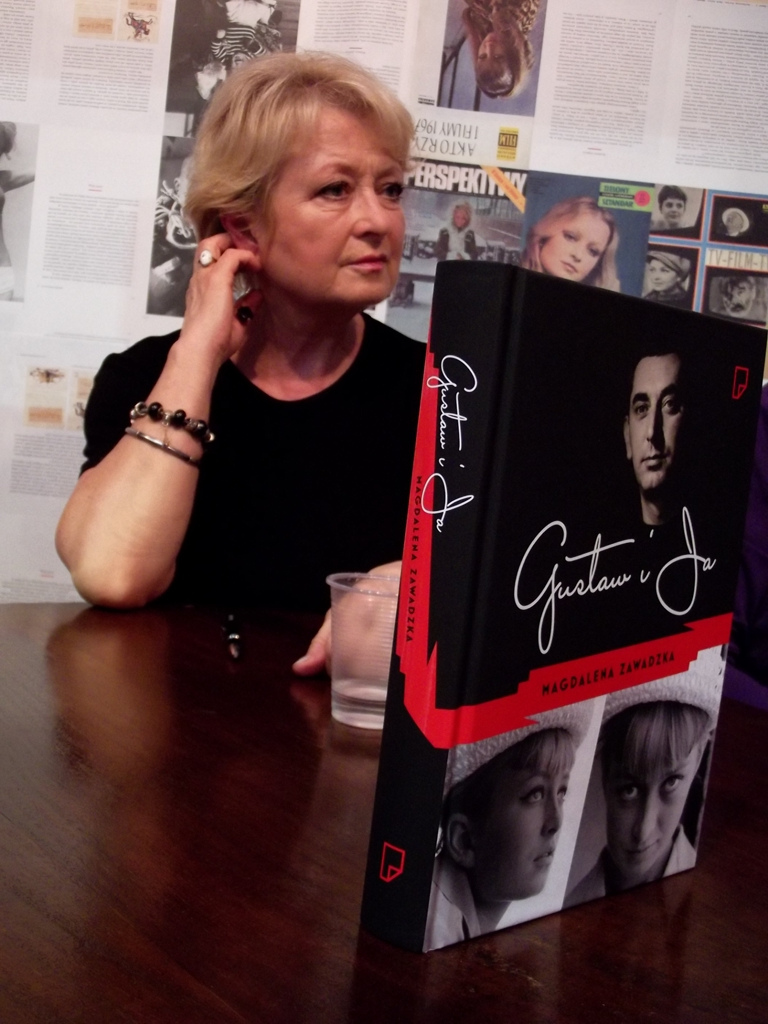 Zdjęcie zostało zrobione podczas 15. targów książki w Krakowie.